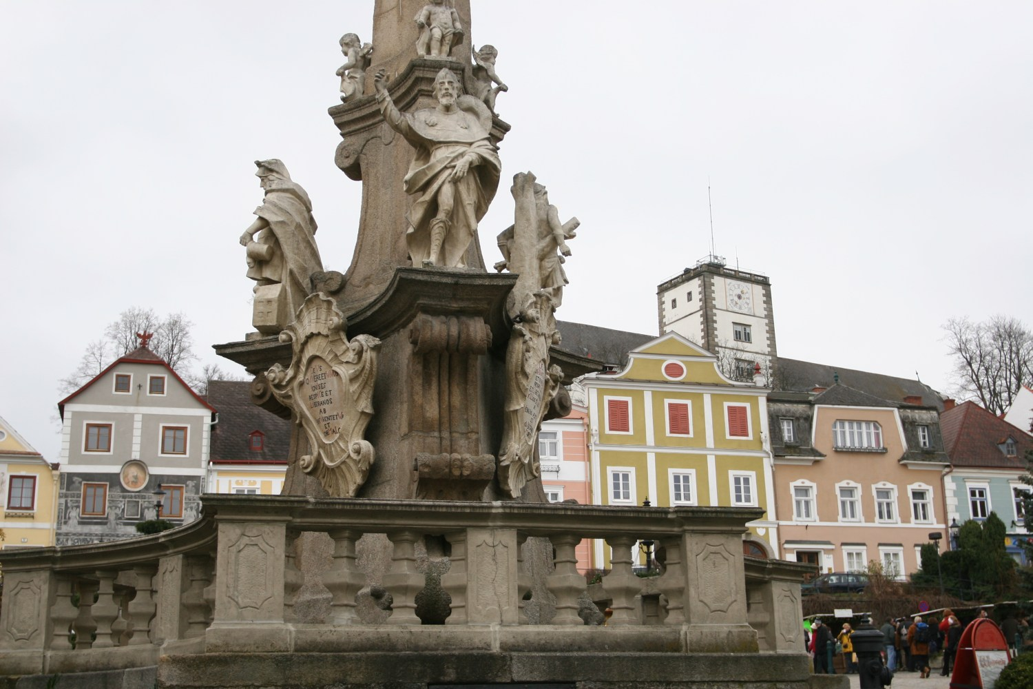 en: Town square of Weitra in the Waldviertel, Lower Austria, with Rennaissance castle of the Fürstenberg family de: Hauptplatz von Weitra, Niederösterreich mit Dreifaltigkeitssäule und dem Rennaissanceschloß der Familie Fürstenberg.